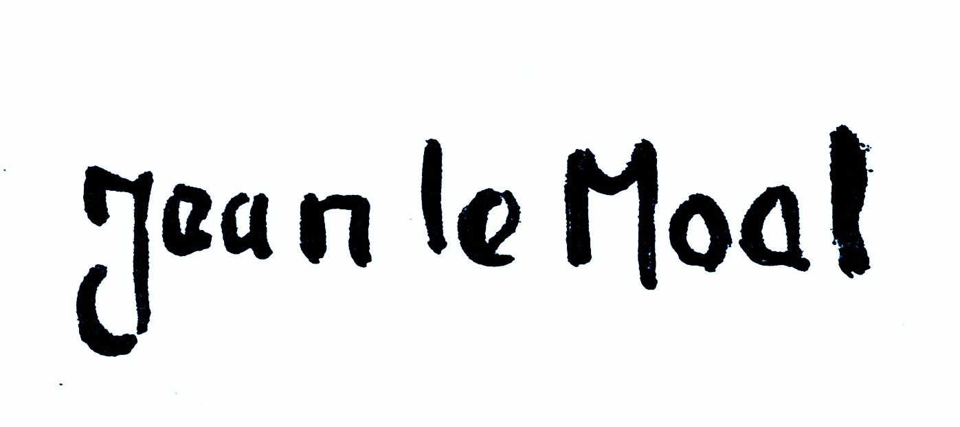 Signature du peintre Jean Le Moal, scan d'après carton d'invitation. This signature is believed to be ineligible for copyright and therefore in the public domain because it falls below the required level of originality for copyright protection both in the United States and in the source country (if different). In this case, the source country (e.g. the country of nationality of the signatory) is believed to be France. Cette image ou le texte qui y est représenté est seulement composé de formes géométriques simples et de texte. Elle n’atteint pas le seuil d'originalité nécessaire pour la protection du droit d’auteur, et est donc du domaine public. See autographs of Magritte and Picasso